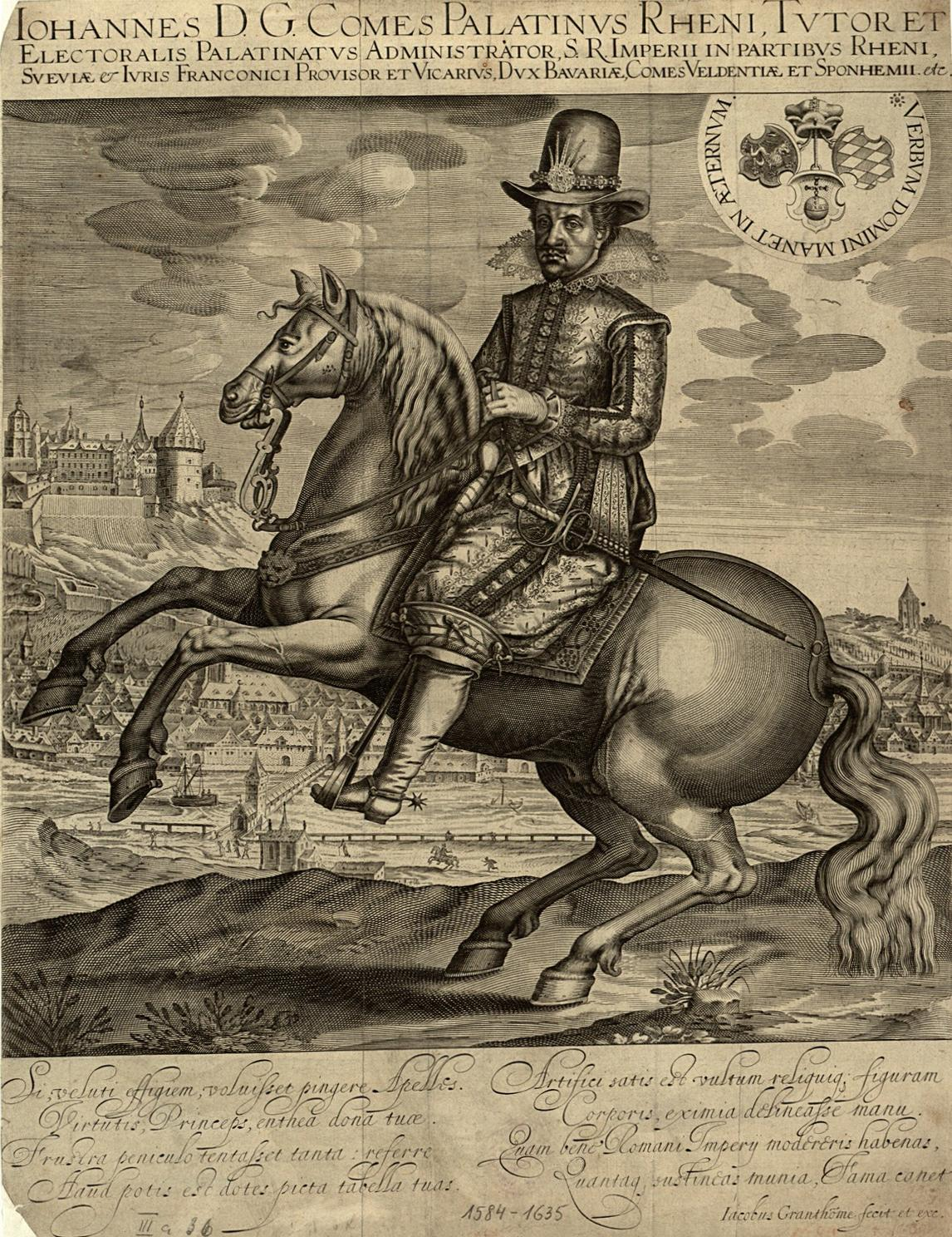 Beschreibung: 1584-1635 Vormund Kurfürst Friedrichs V. von der Pfalz; Aufbewahrung/Standort: Universitätsbibliothek Heidelberg; Material/Technik: Kupferstich